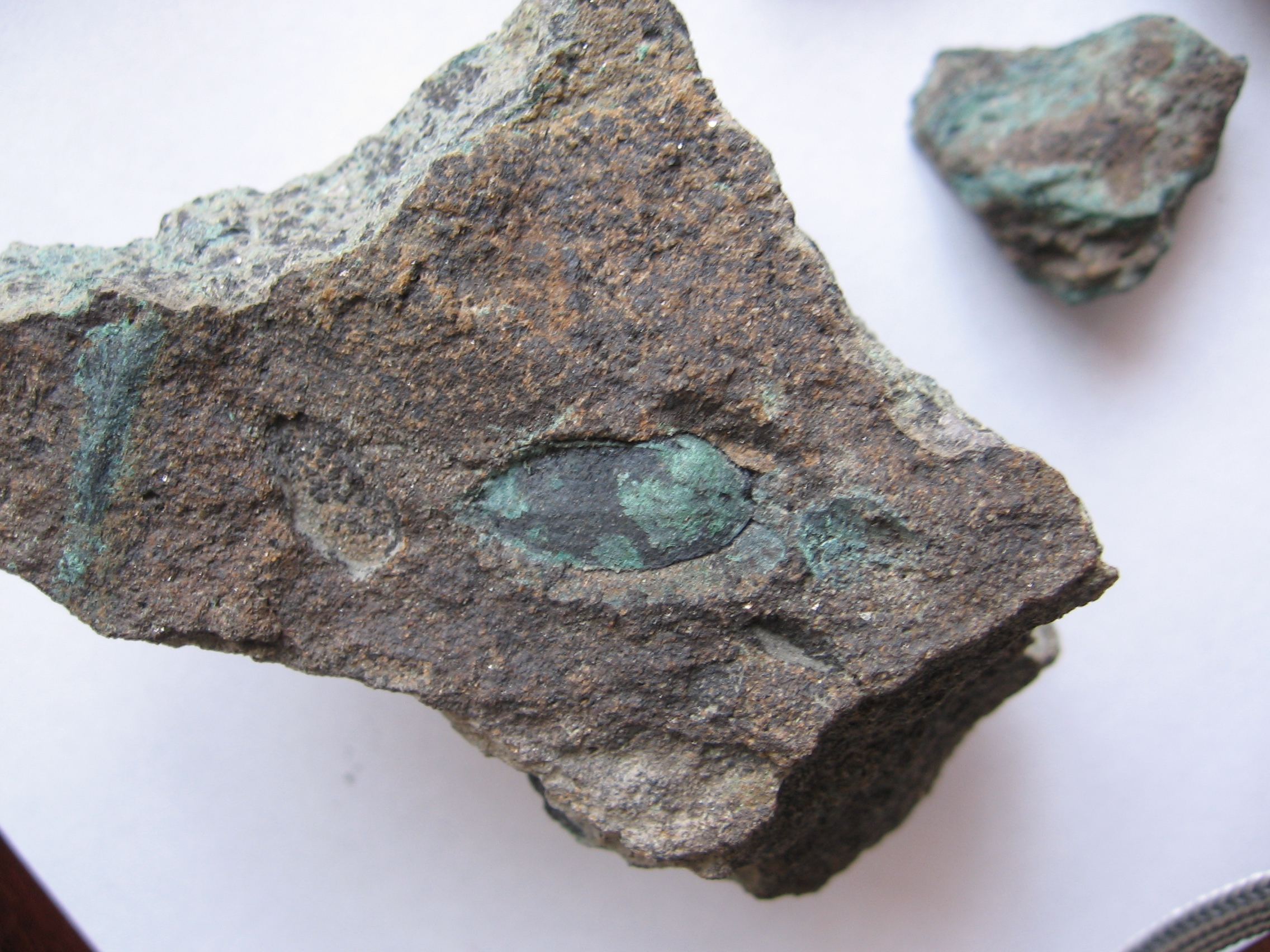 мідна руда: Фото